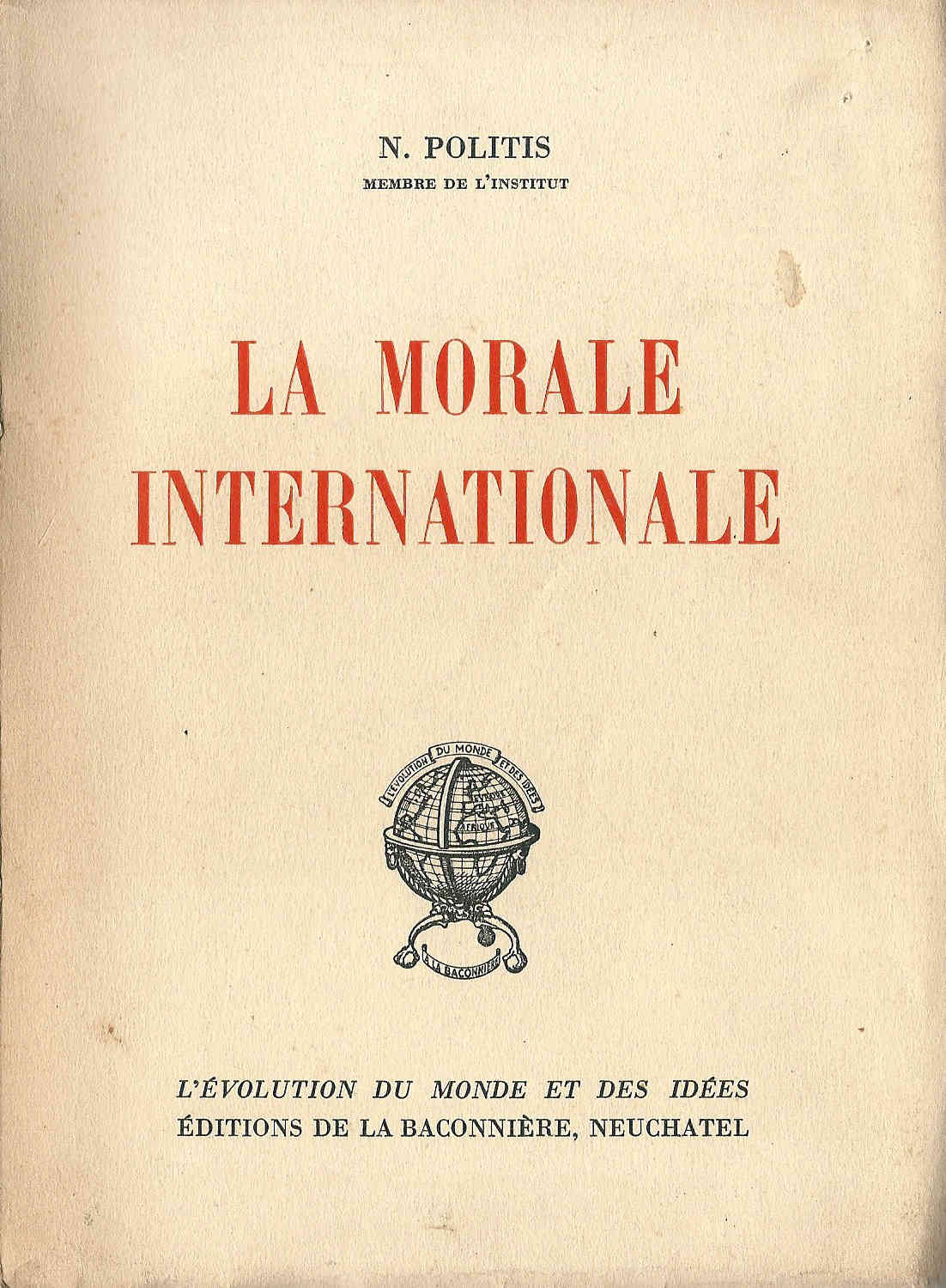 Nicolas Politis (1872-1942) ; couverture de La Morale Internationale.